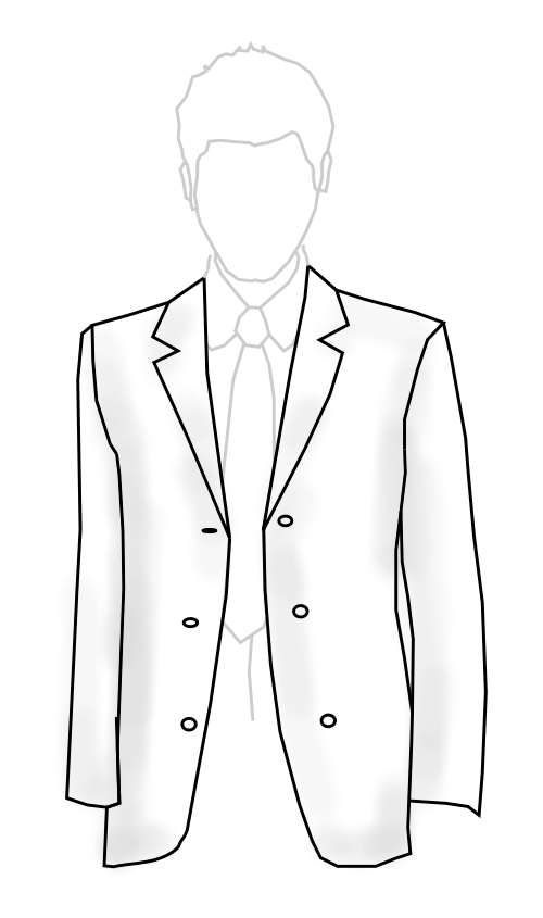 Zeichnung Herrensakko